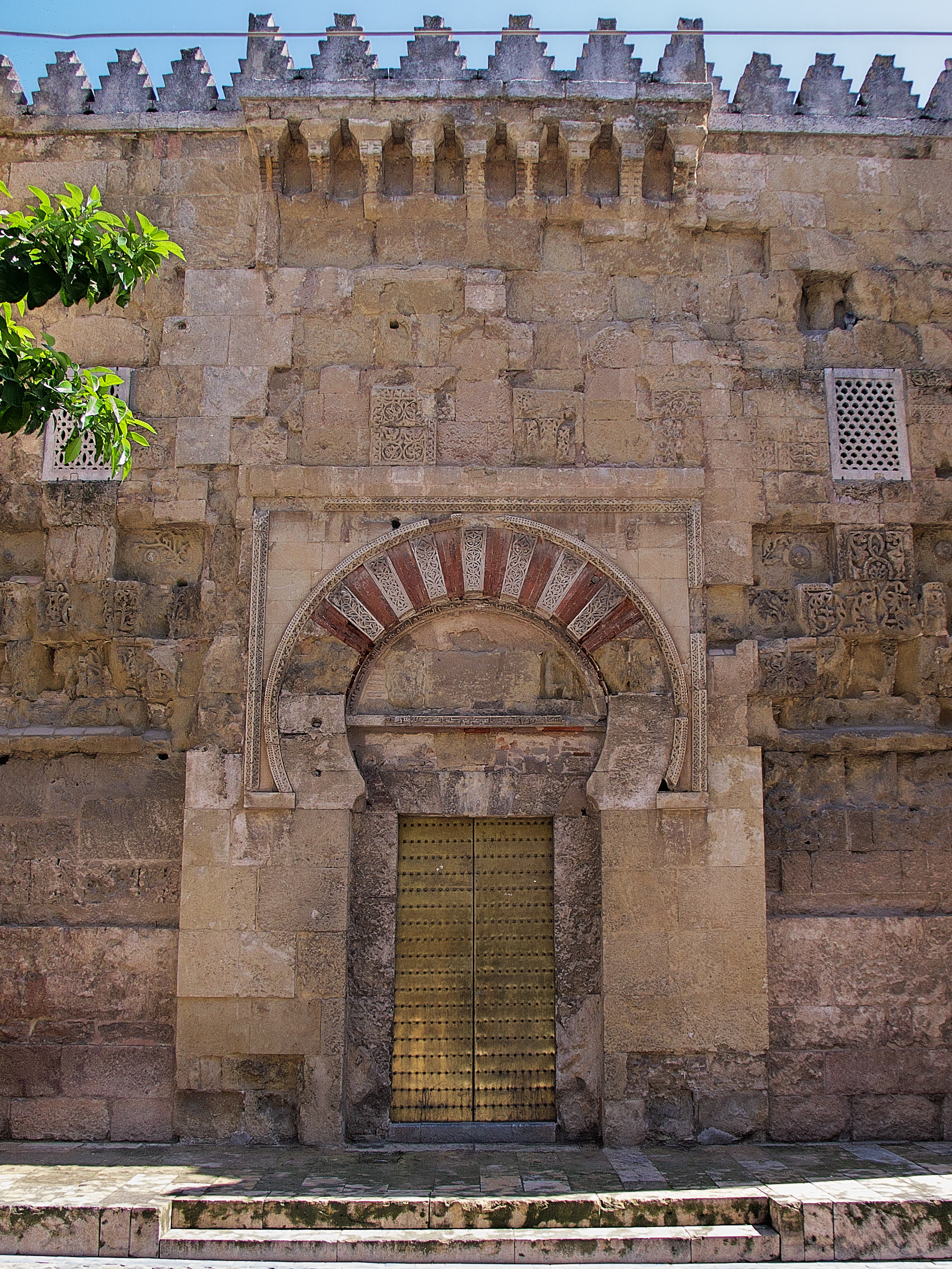 Puerta de Bab al-Wuzara. De los Visires. De San Esteban. De Bab al-Uzara. De San Sebastián. (785-855). El conjunto decorativo más antiguo de la arquitectura andalusí.- Construida por el emir omeya ABD- al-RAHMAN I (756-788) en el año 786, restaurada el emir MUHAMMAD I en 855.- Estaba reservada para el soberano y sus visires (ministros).- Nace un nuevo arco de herradura enmarcado por un alfiz (aportación visigoda).- Es necesario tener presente el mal estado de conservción, por lo que el planteamiento decorativo, la composición tripartita, los arcos ciegos, etc., requieren otro soporte, dibujos simulados, alzados, etc. Por supuesto, el Consejo Superior de Investigaciones Científicas, dispone de conseguidos alzados fotogramétricos y algunas guias visuales también ayudan a comprender este primer modelo de la belleza del arte hispano musulmán o cordobés, que establece los rasgos característicos de la decoración parietal andalusí.- (Un apunte cronológico: La fachada del mihrab del califa al-Hakam II, que continúa con el esquema artístico de esta puerta, se termina aproximadamente en año 965 o algo posterior. 180 años de la terminación de esta puerta). Otro apunte a considerar es el informe de un prestigioso arqueólogo e historiador español, que estudió en profundidad la Mezquita, a principios del siglo XX, el cual atribuye esta puerta a la Iglesia de San Vicente. Lo que justificaría la etiqueta de "Visigodos".